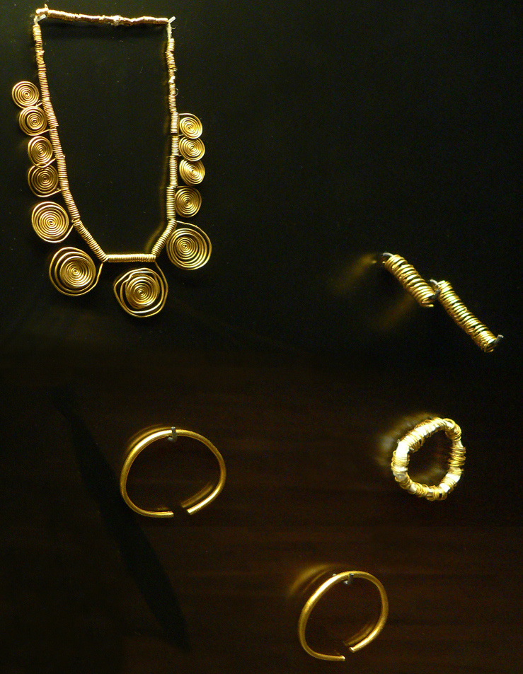 Goldfund von Lorup, Aufnahme bei der Pressekonferenz zur Eröffnung der Ausstellung im Niedersächsischen Landesmuseum Hannover zur Schau Im Goldenen Schnitt - Niedersachsens längste Ausgrabung